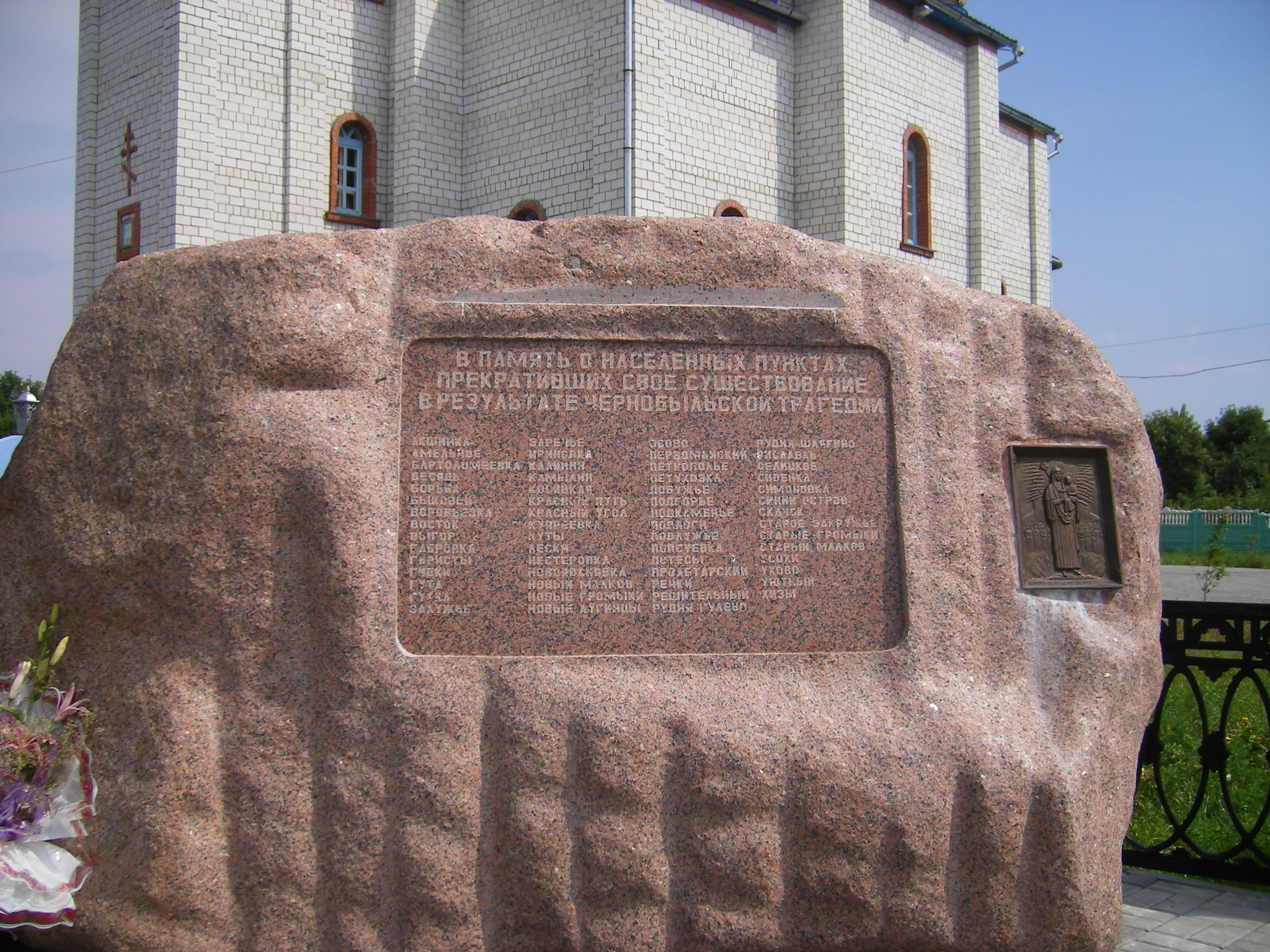 Vetka (Belarusz), a kitelepített falvak emlékköve